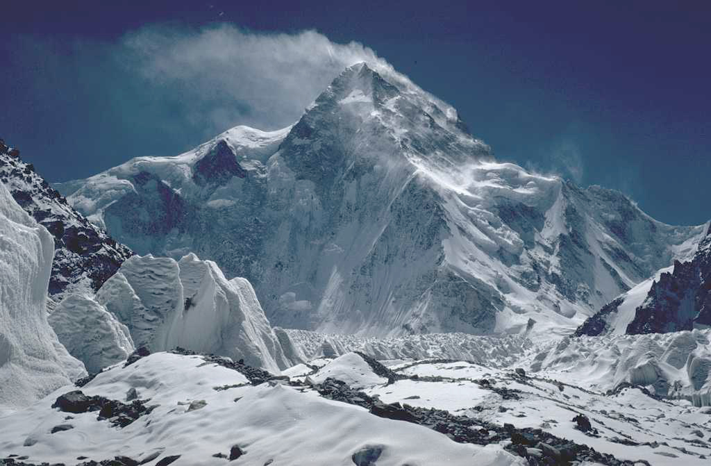 Nordseite des K2 von China aus gesehen